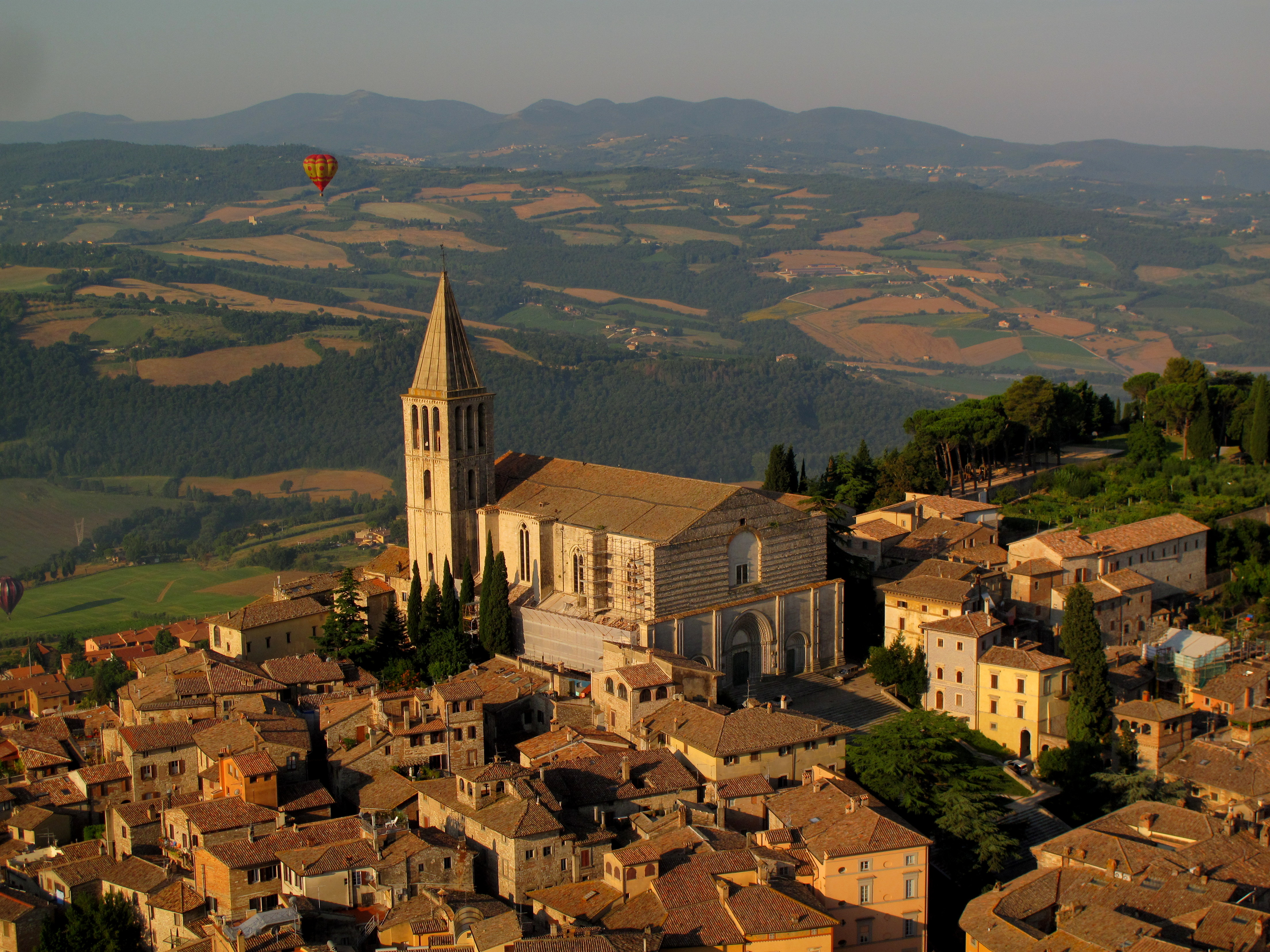 Tempio di San Fortunato This is a photo of a monument which is part of cultural heritage of Italy.